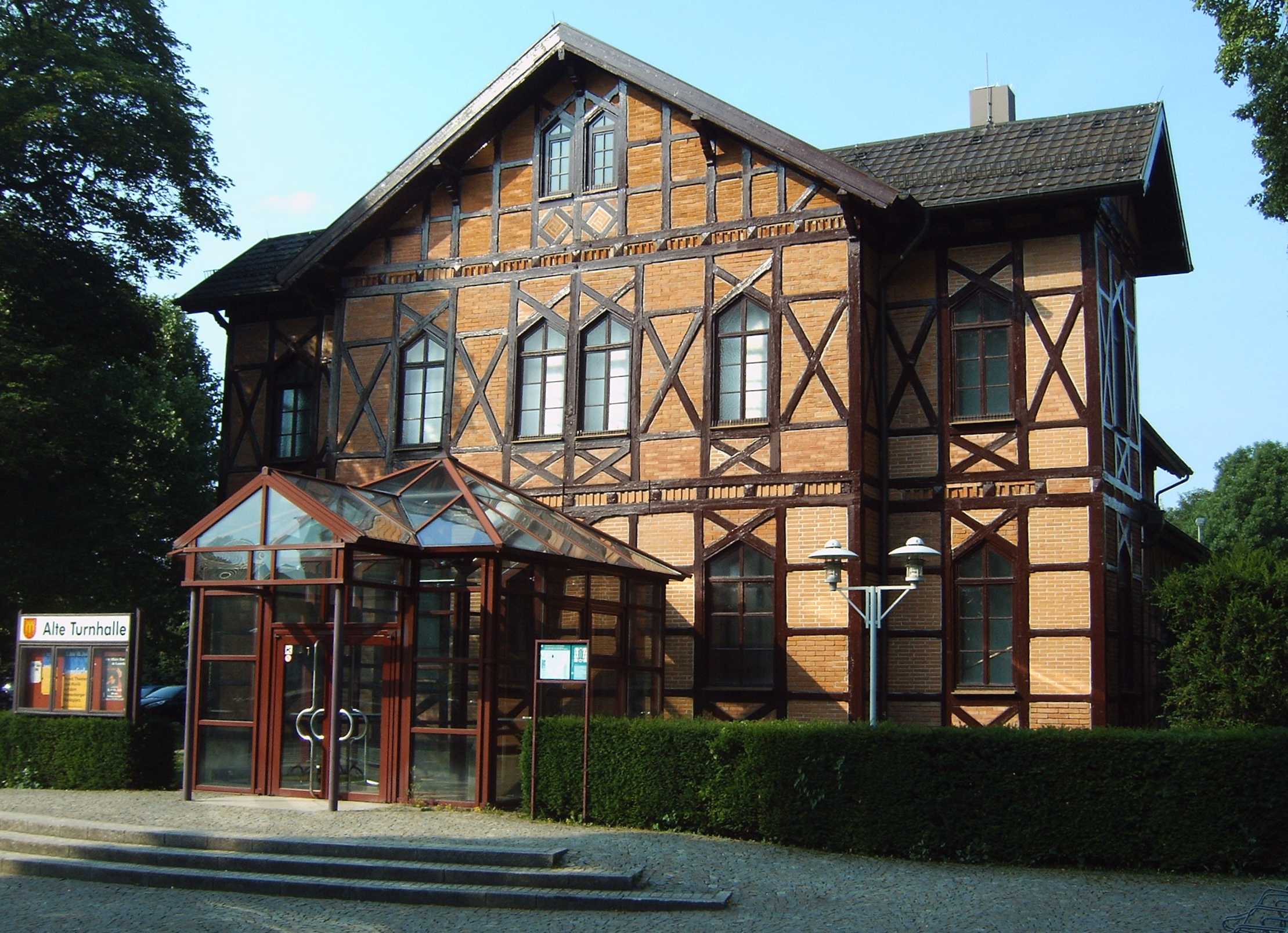 Alte Turnhalle Herrenberg, erbaut 1886